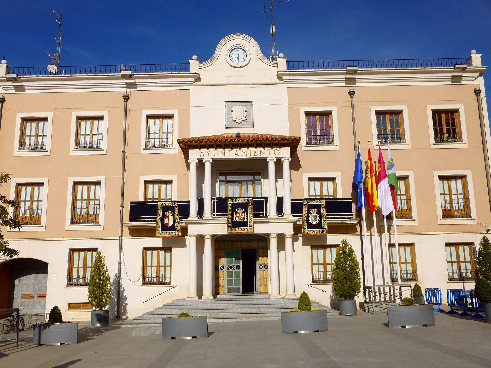 Ayuntamiento de Socuéllamos, Ciudad Real